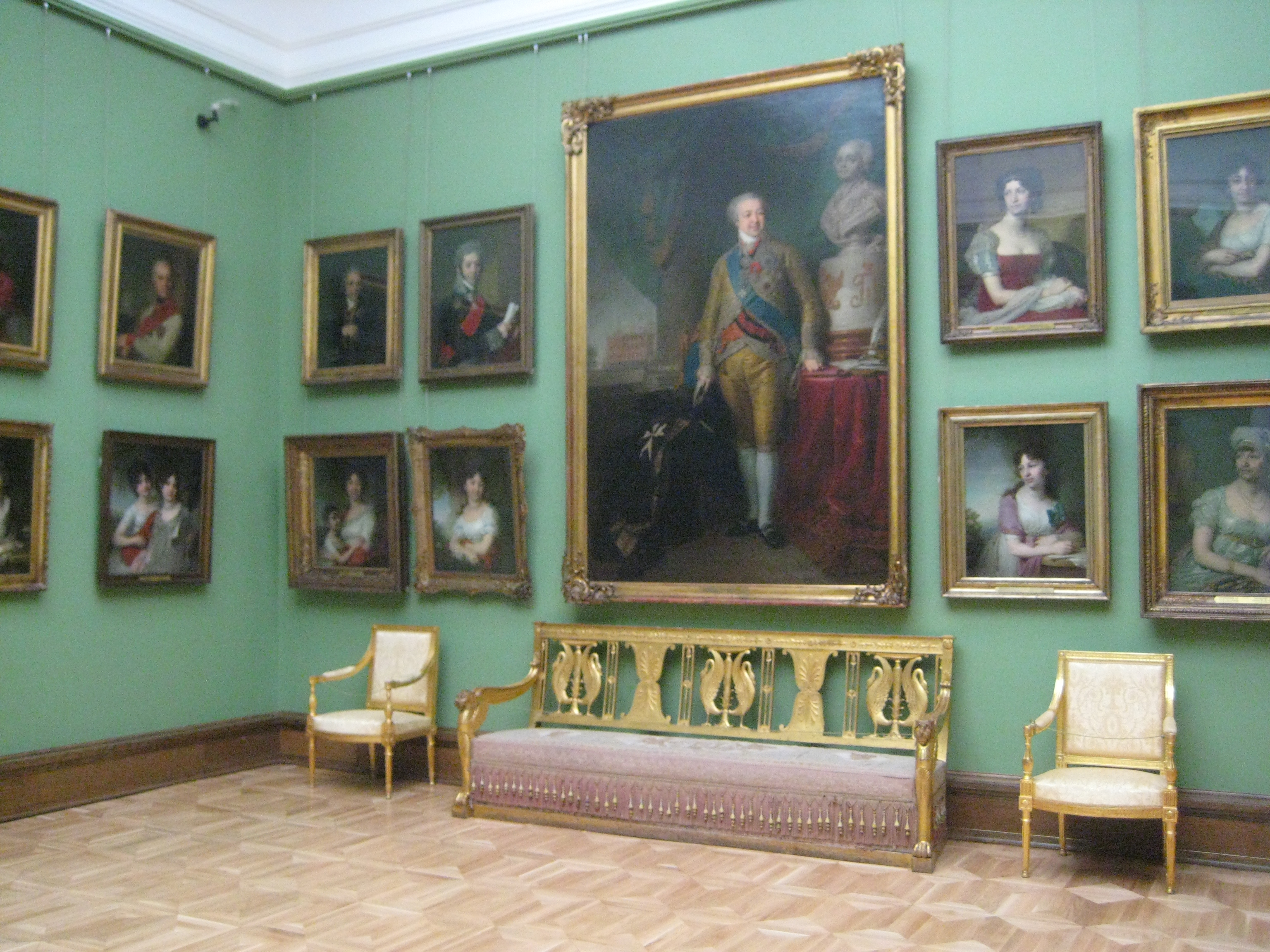 Третьяковская галерея. Зал искусства 18 века.